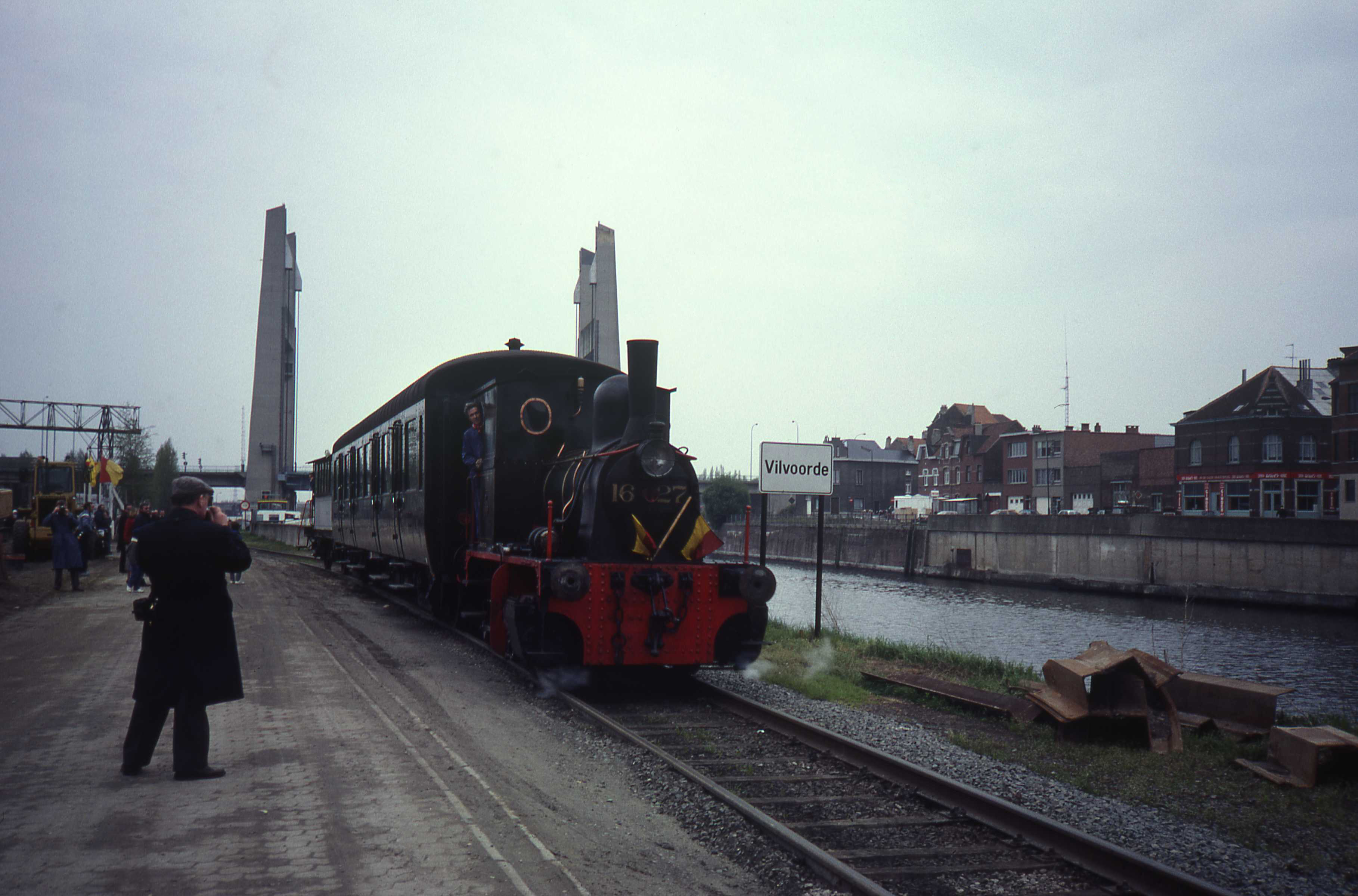 Stoomgebeuren (Museum Stoomtrein der Twee Bruggen) in Vilvoorde langs het kanaal.